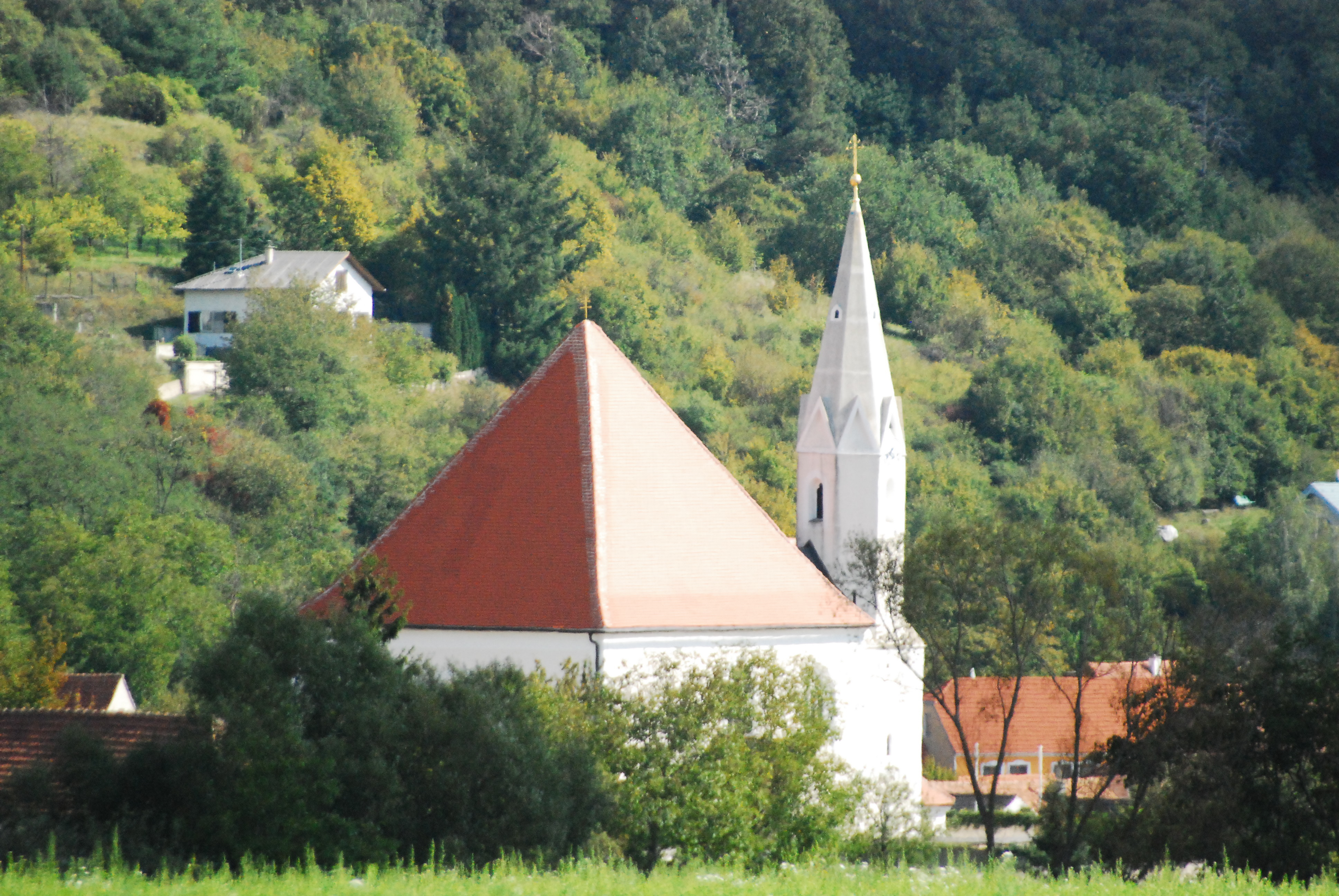 Kath. Pfarrkirche hl. Johannes der Täufer und Friedhof